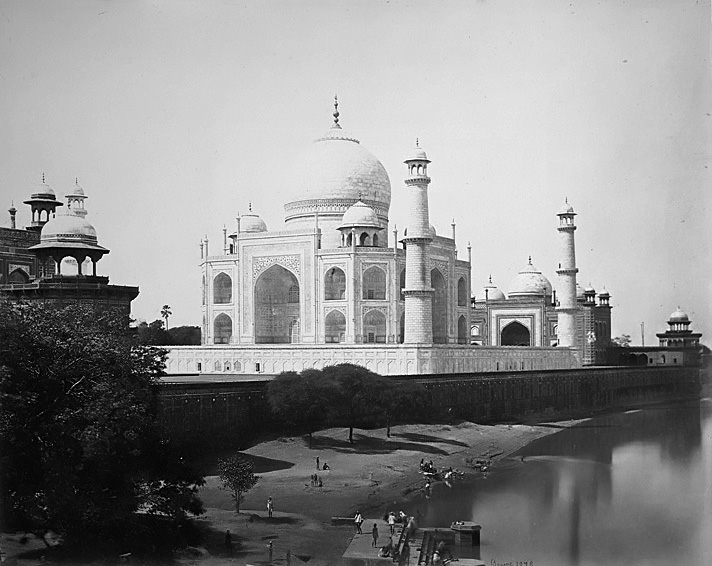 Taj Mahal in Agra, India.